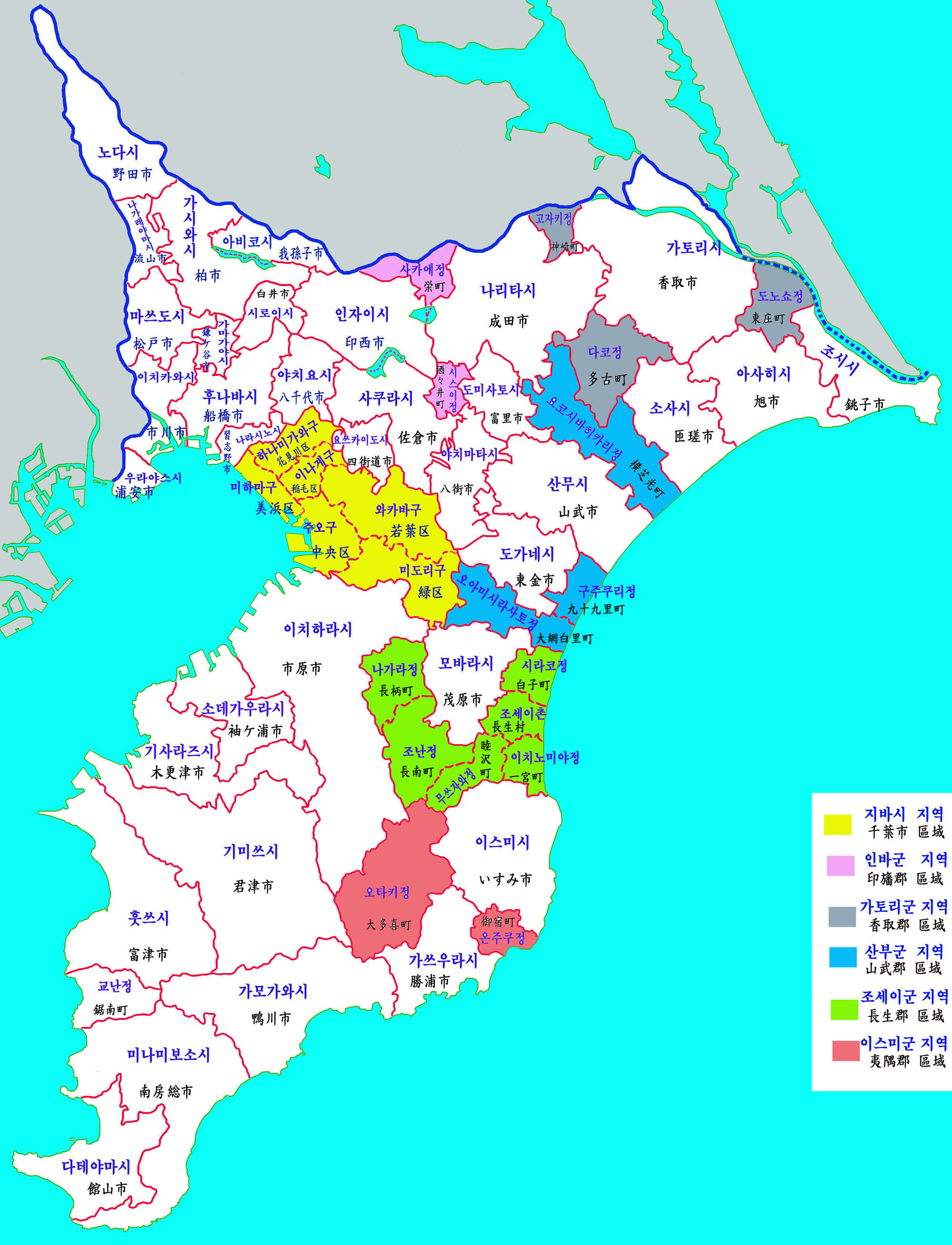 지바현 행정구역